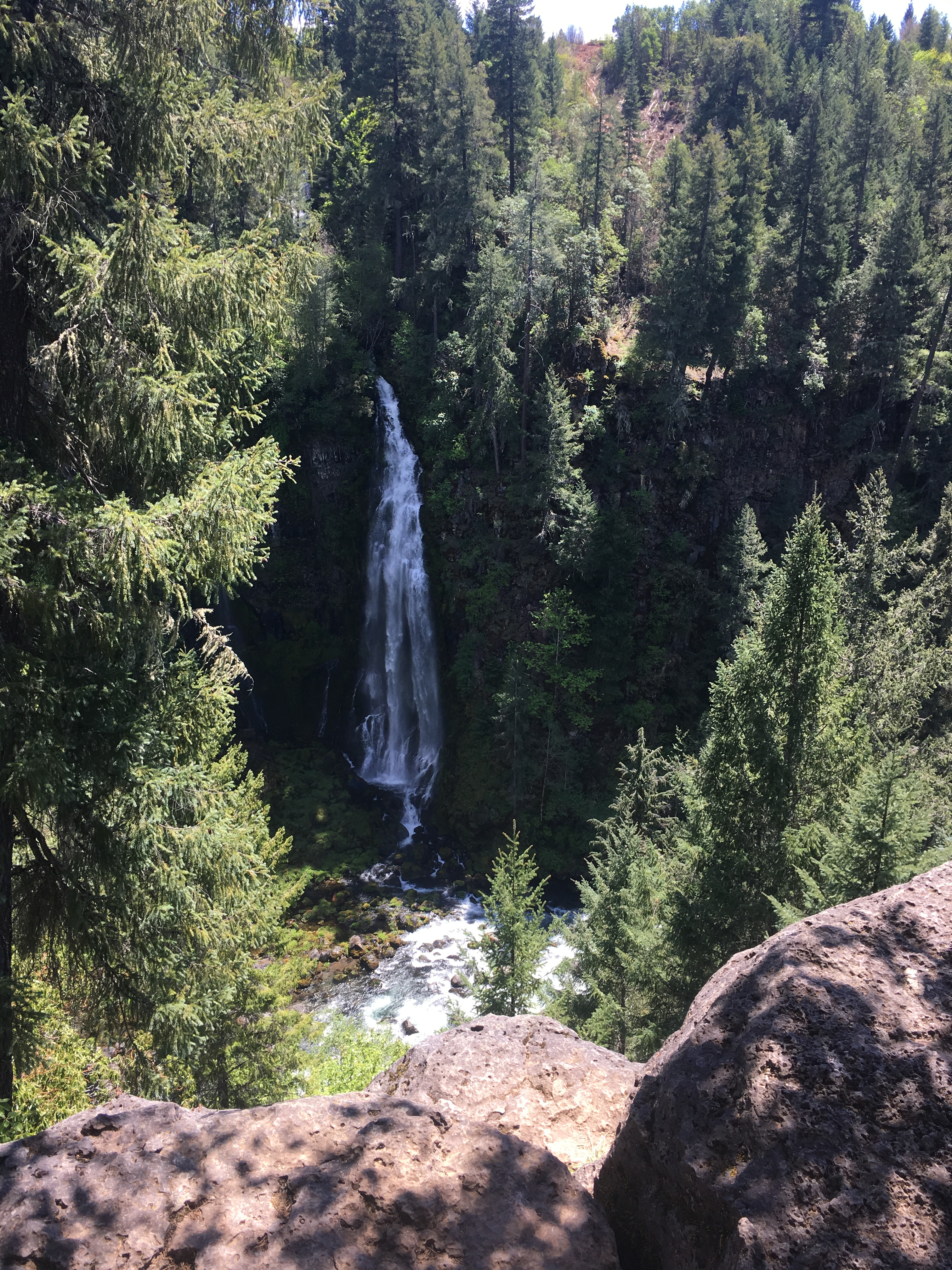 Cascada Barr Creek Falls en l vecindad de la comunidad de Prospect, Oregon.